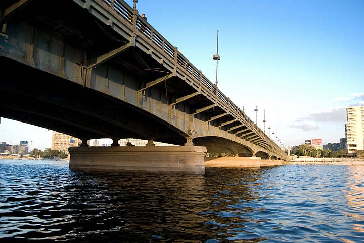 Tahrir Bridge